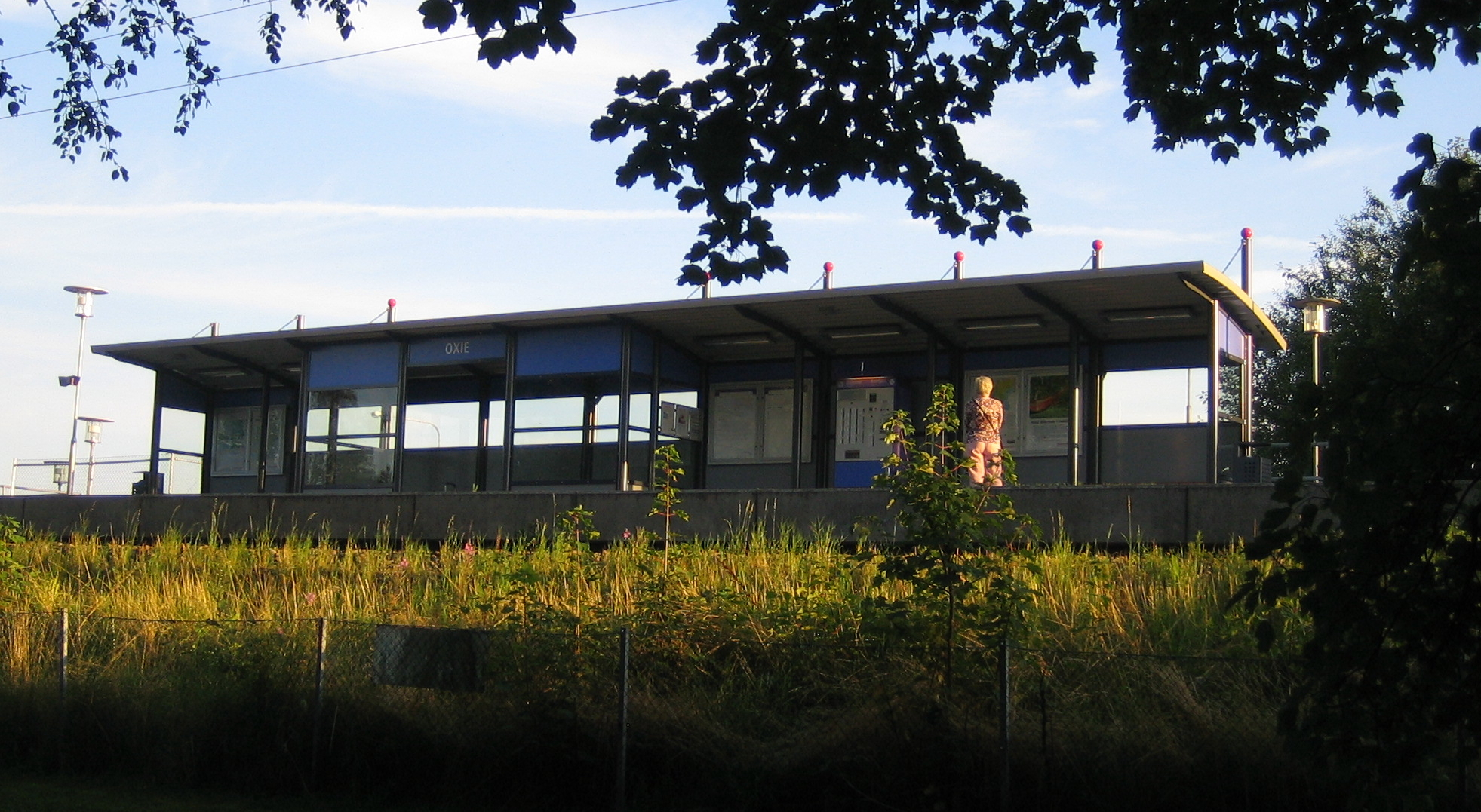 Oxie commuter station, Malmö